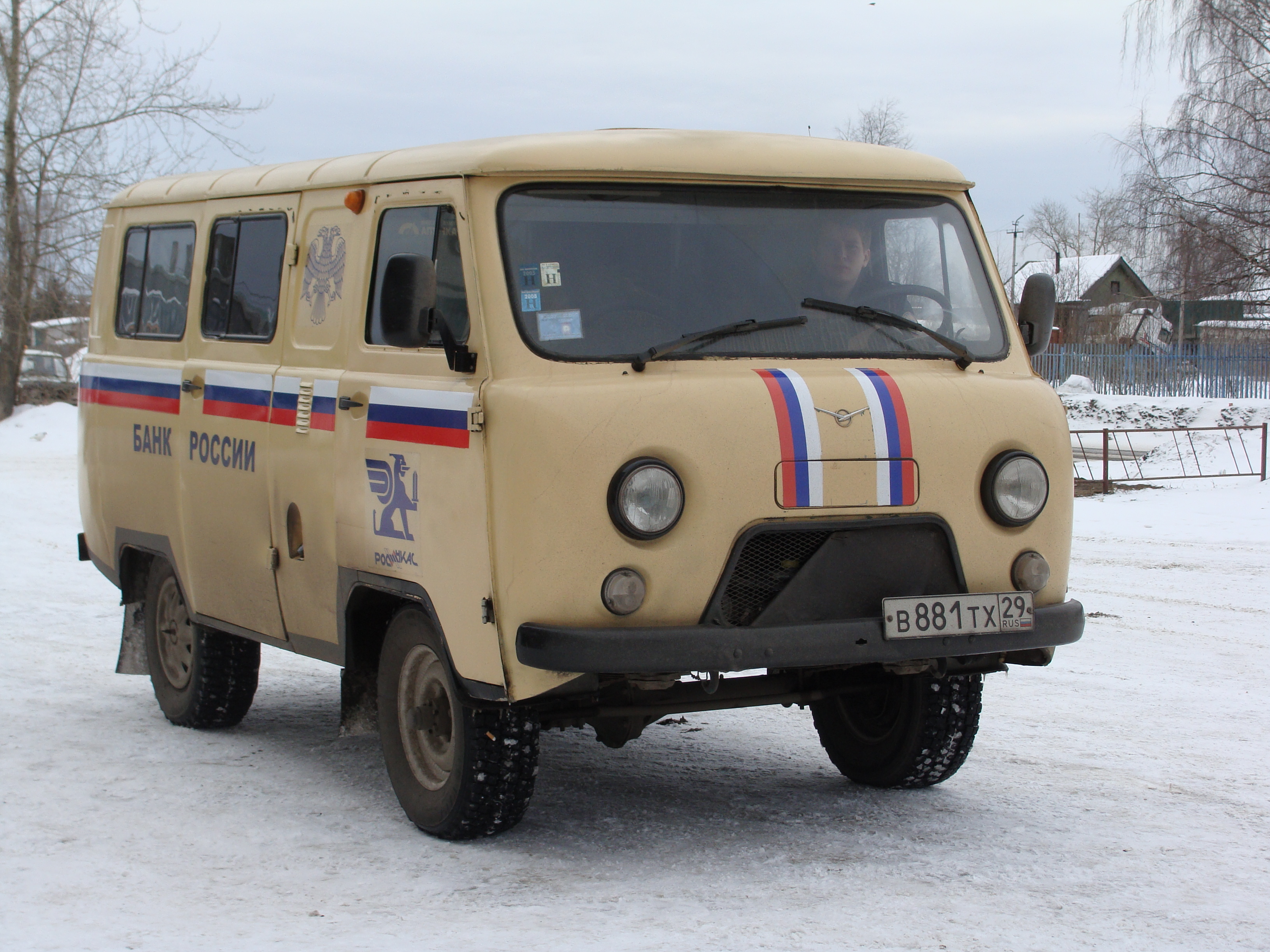 УАЗ 452 Банк России, Коряжма